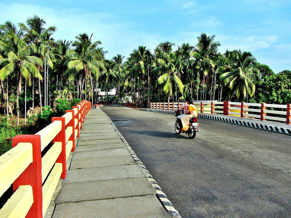 മുറിയങ്കണ്ണി പാലം.